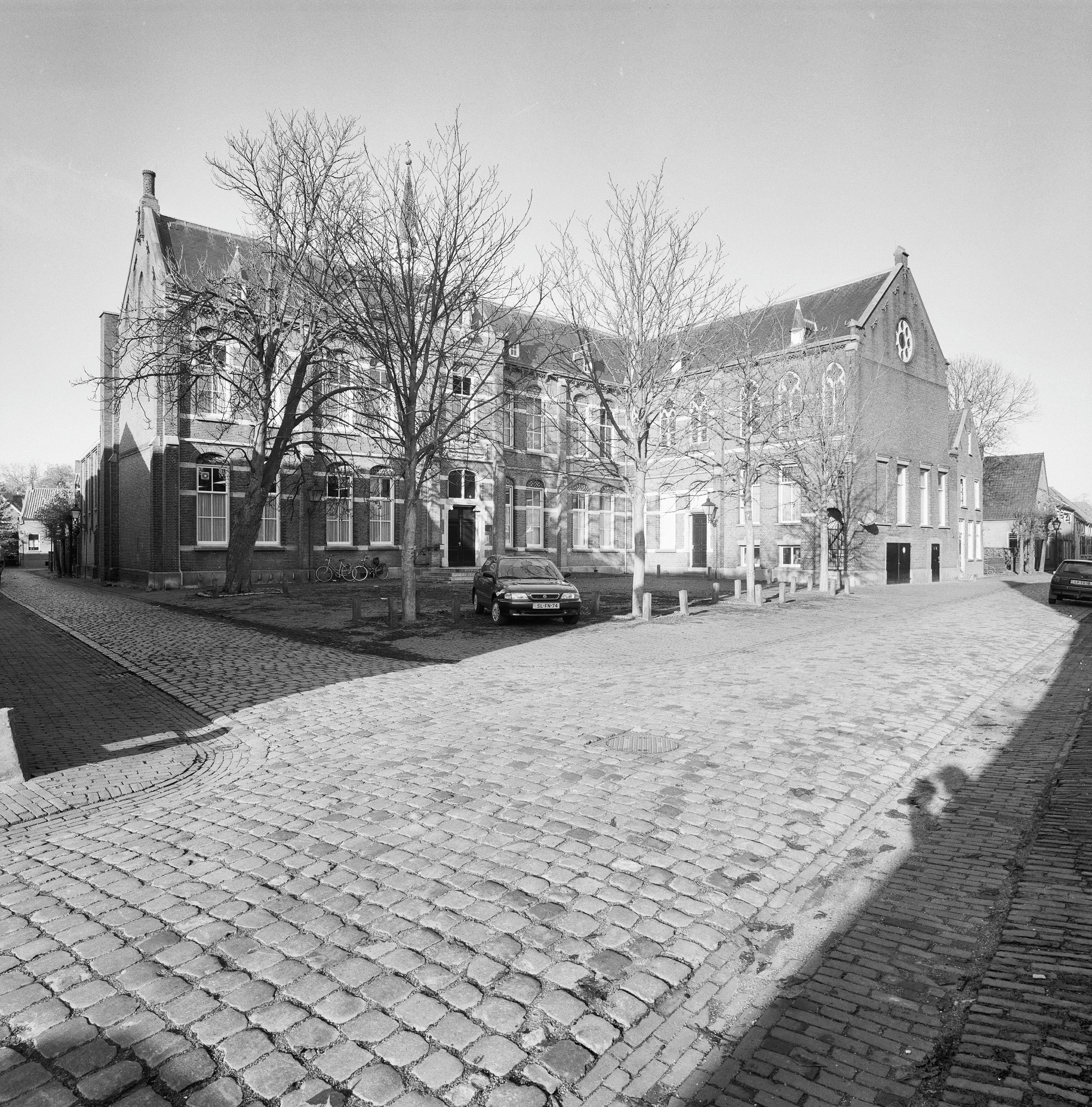 Voormalig Seminarie: Gemeenschapshuis "Acropolis", overzicht